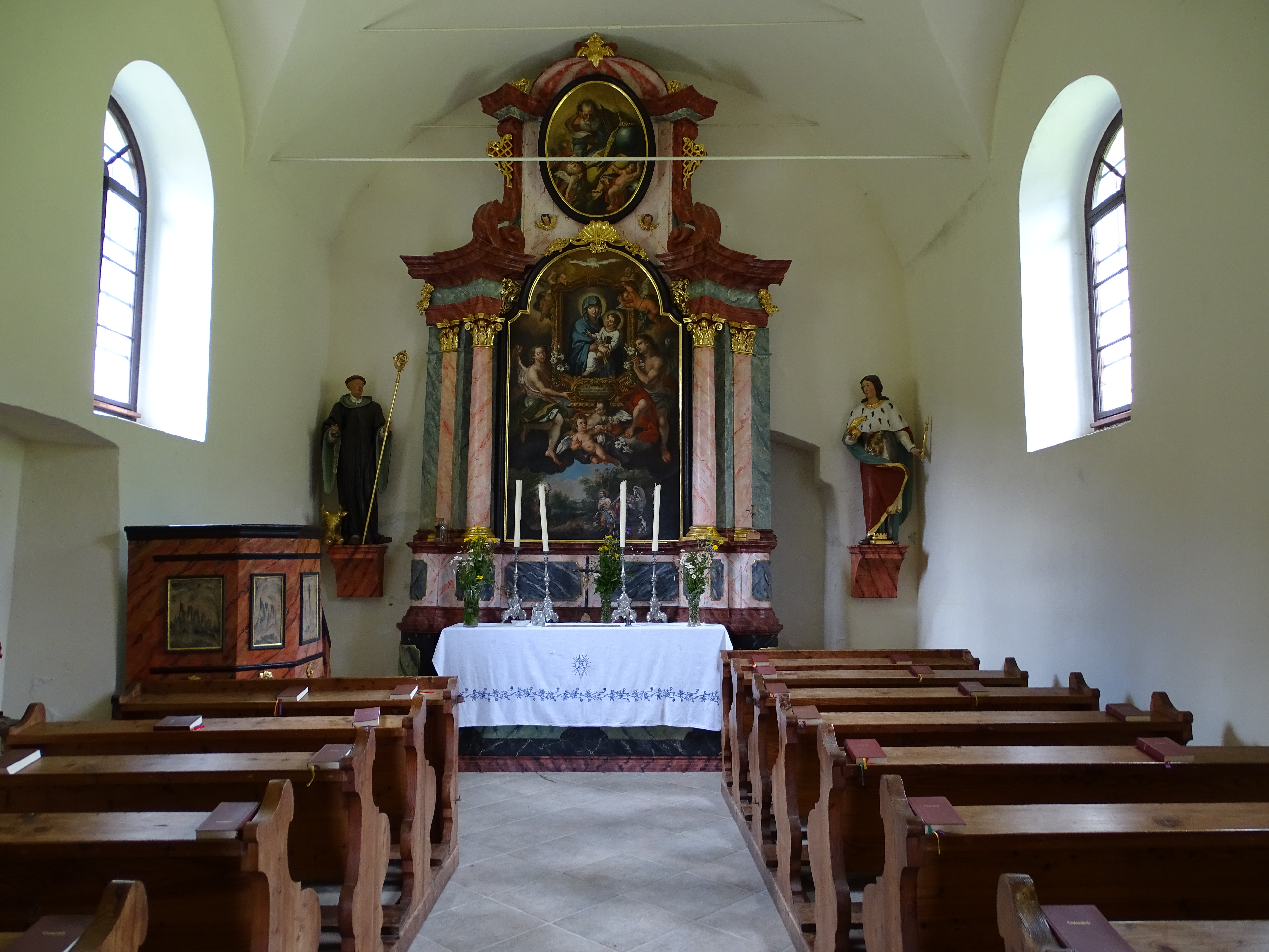 Blick auf den Altar der Wallfahrtskirche Maria Schnee auf der Gleinalpe